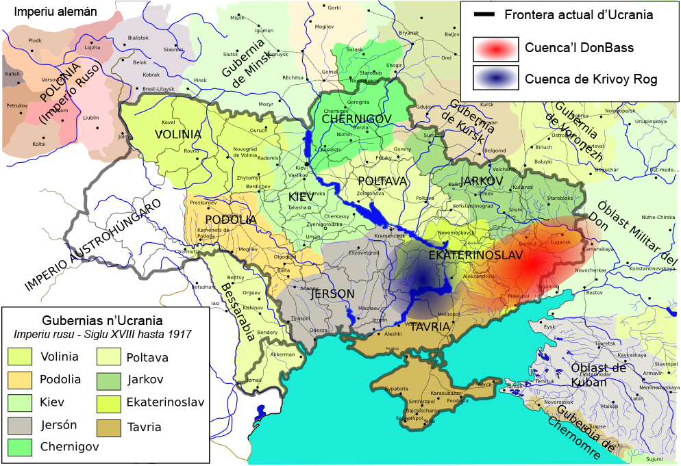 Fronteres d'Ucrania hasta'l 1917.